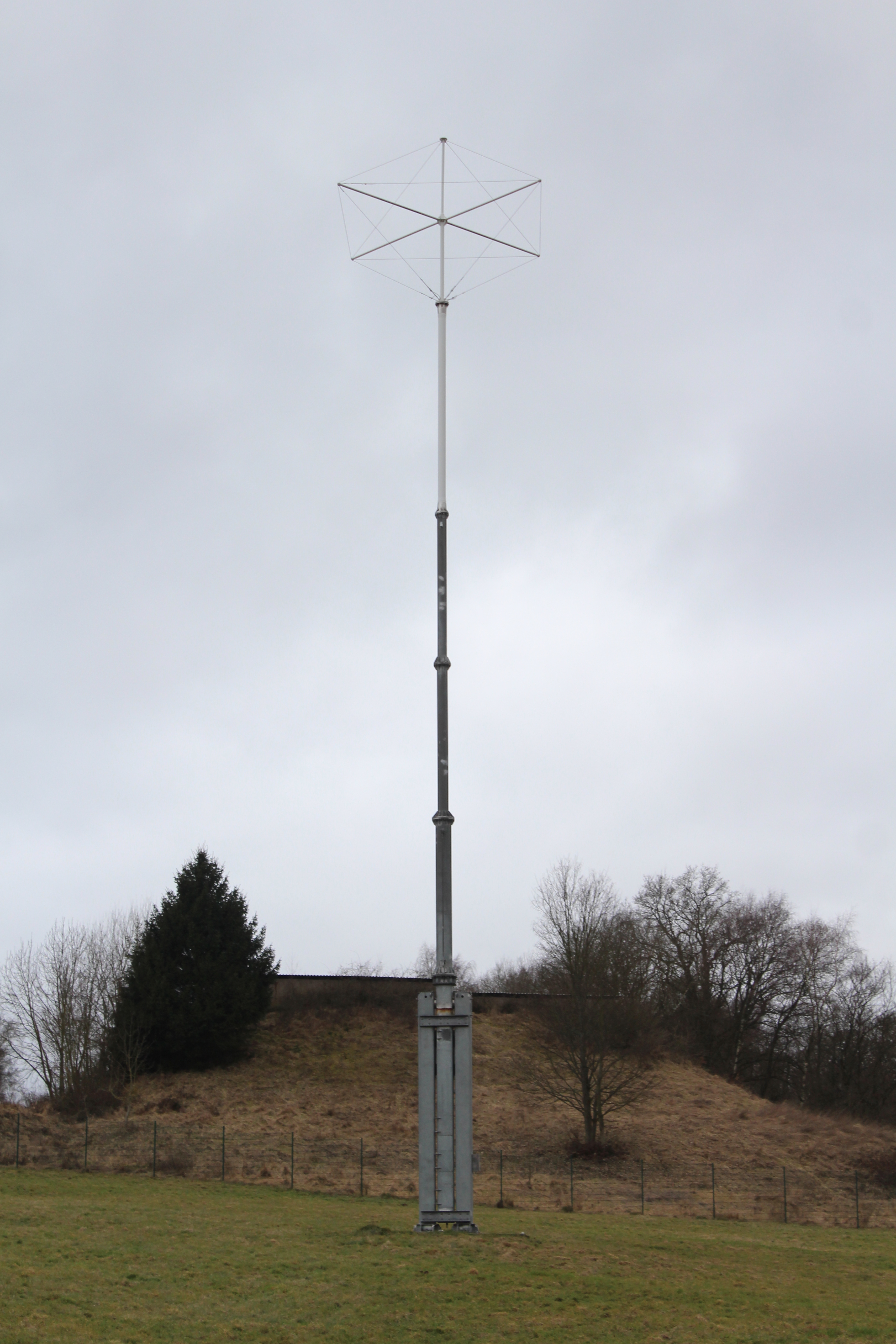 DGPS-Sendeturm Koblenz